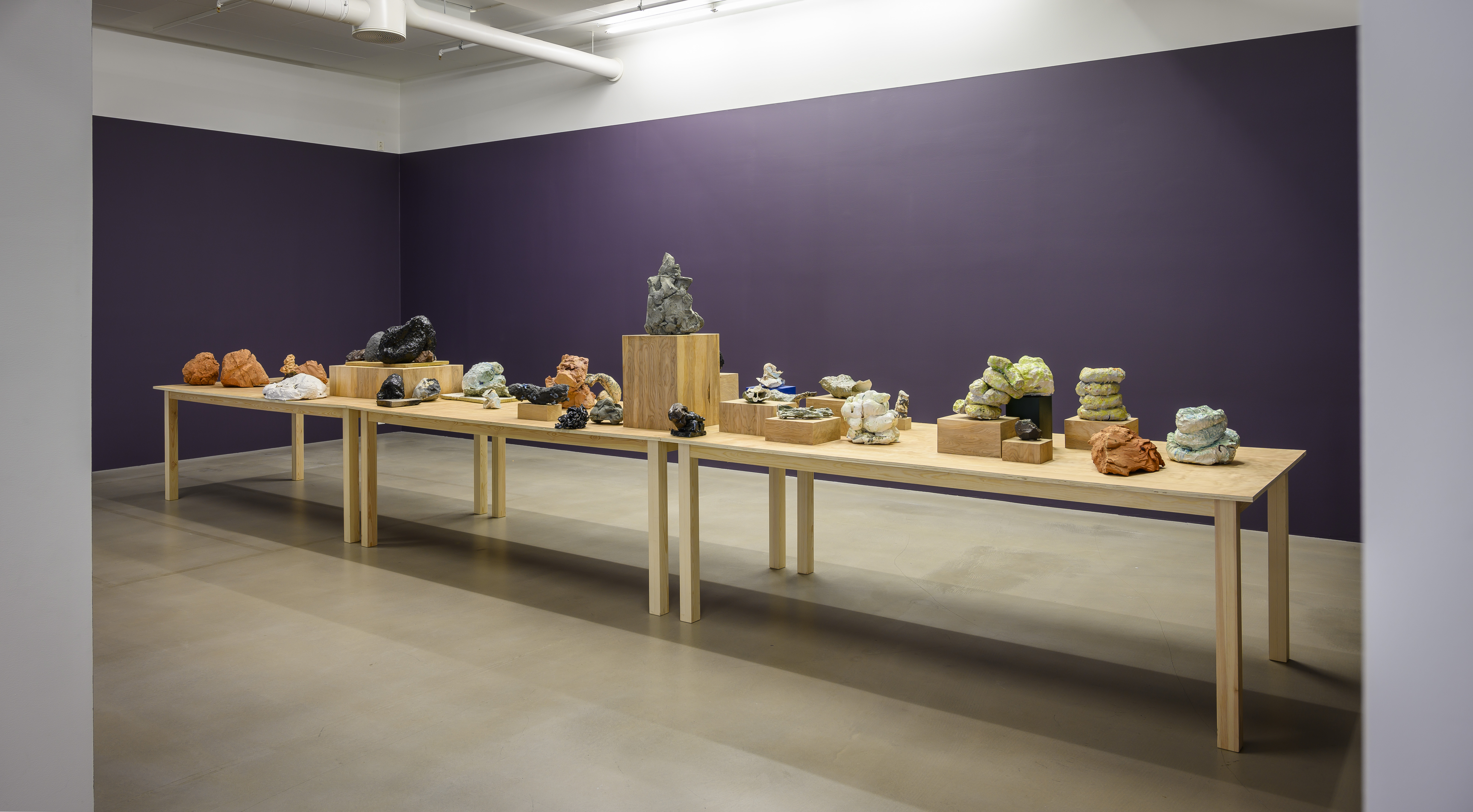 Brit Dyrnes' installasjon «Tilstand». Gruppeutstilling i Trondheim Kunsthall: mind moves with matter, body blends into space (2019)